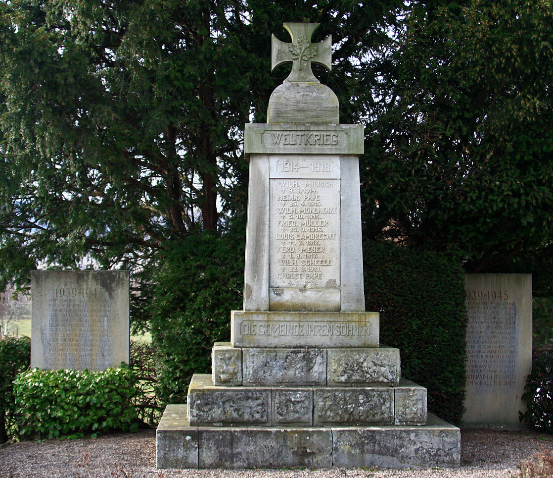 Zum Gedenken an die gefallenen Soldaten der beiden Weltkriege